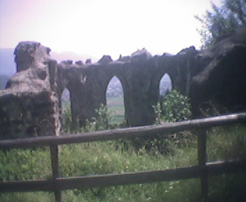 Ruine Ortenburg bei Baldramsdorf, Spittal / Drau in Kärnten / Österreich.